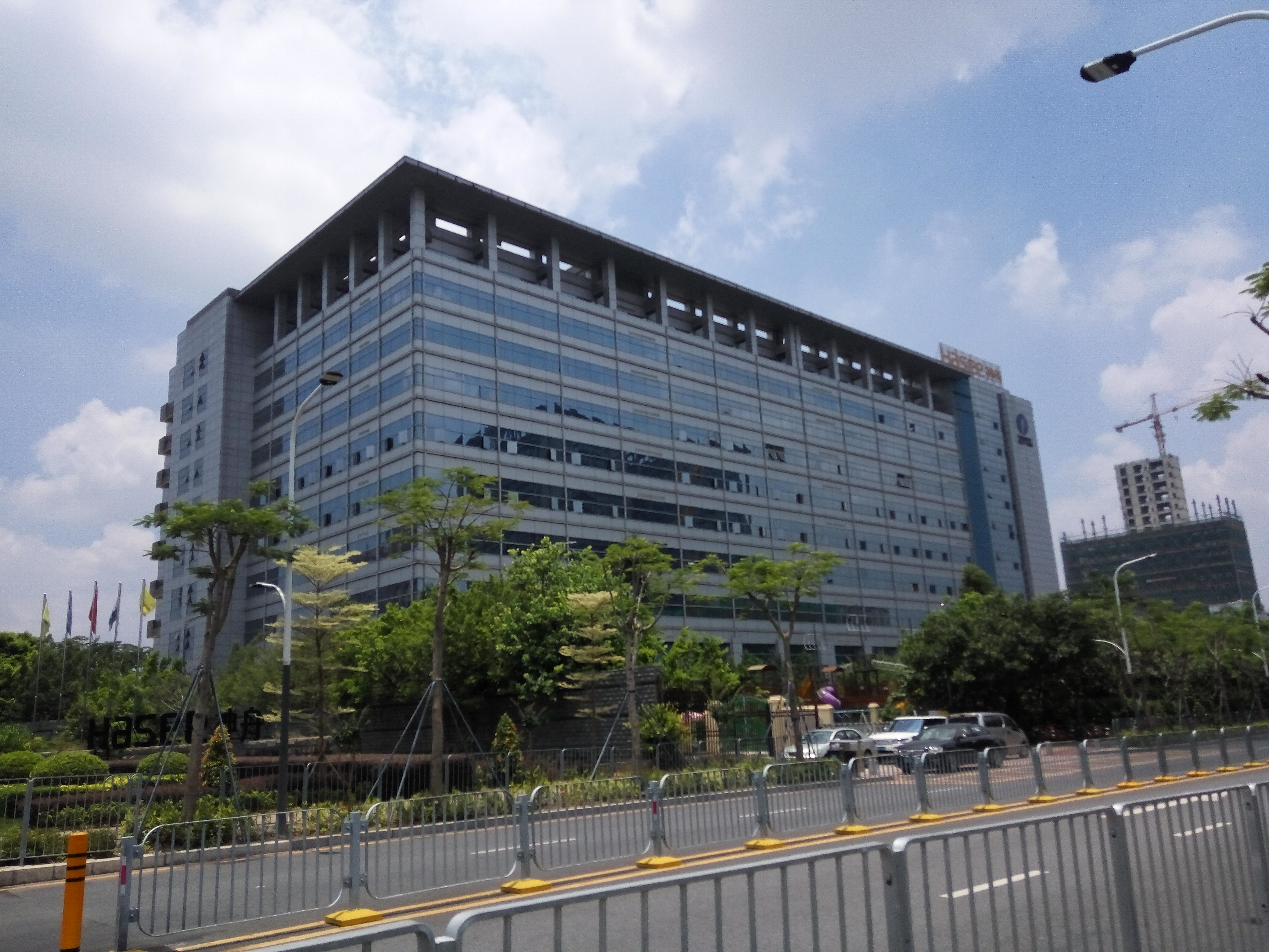 神舟电脑大厦（新天下集团总部）